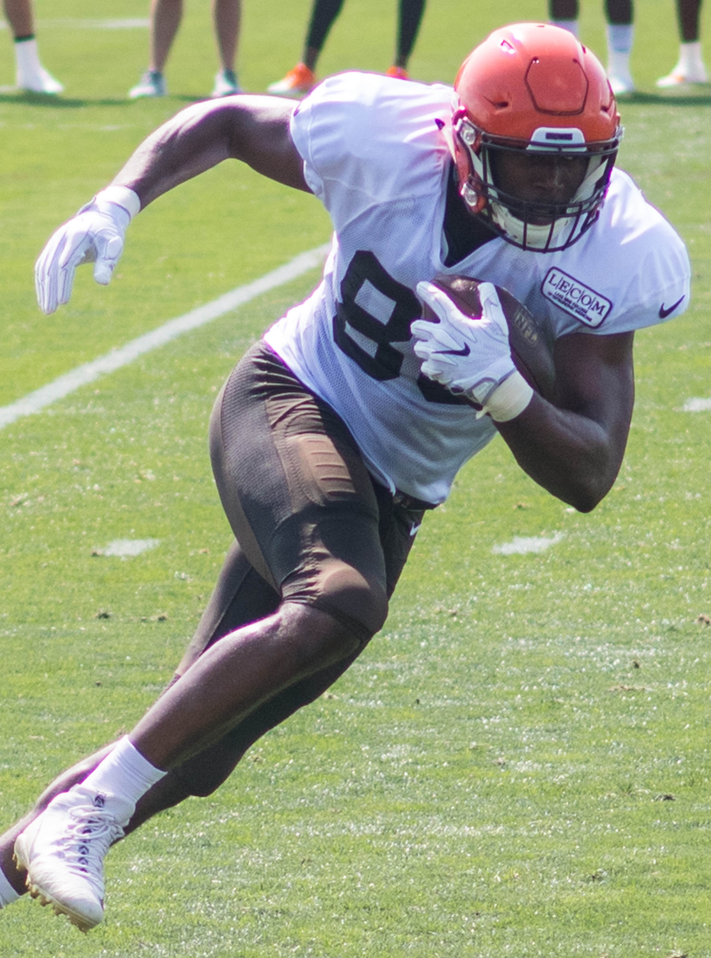 Darren Fells